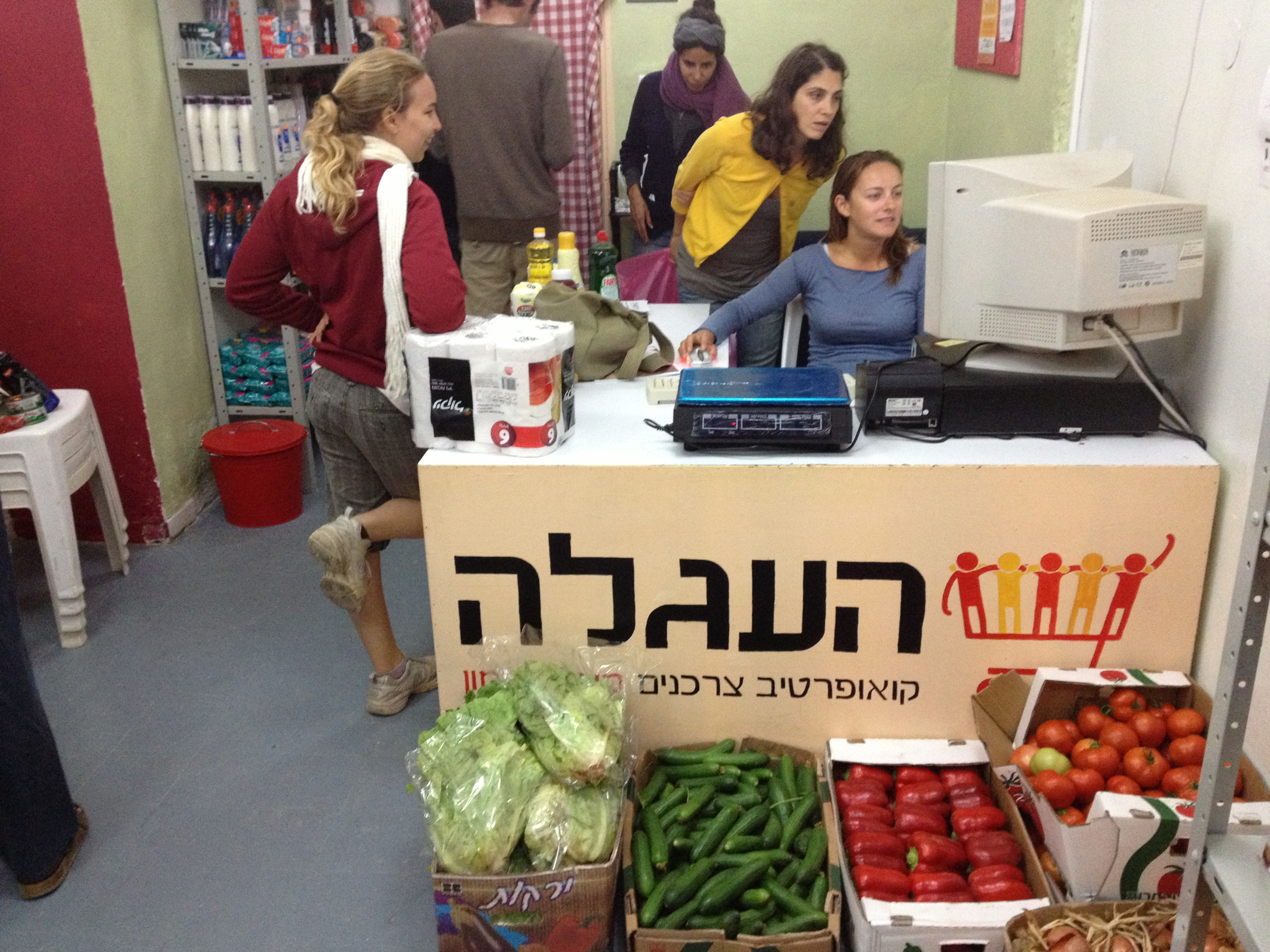 סניף העגלה הראשון במצפה רמון, מראה מבפנים.